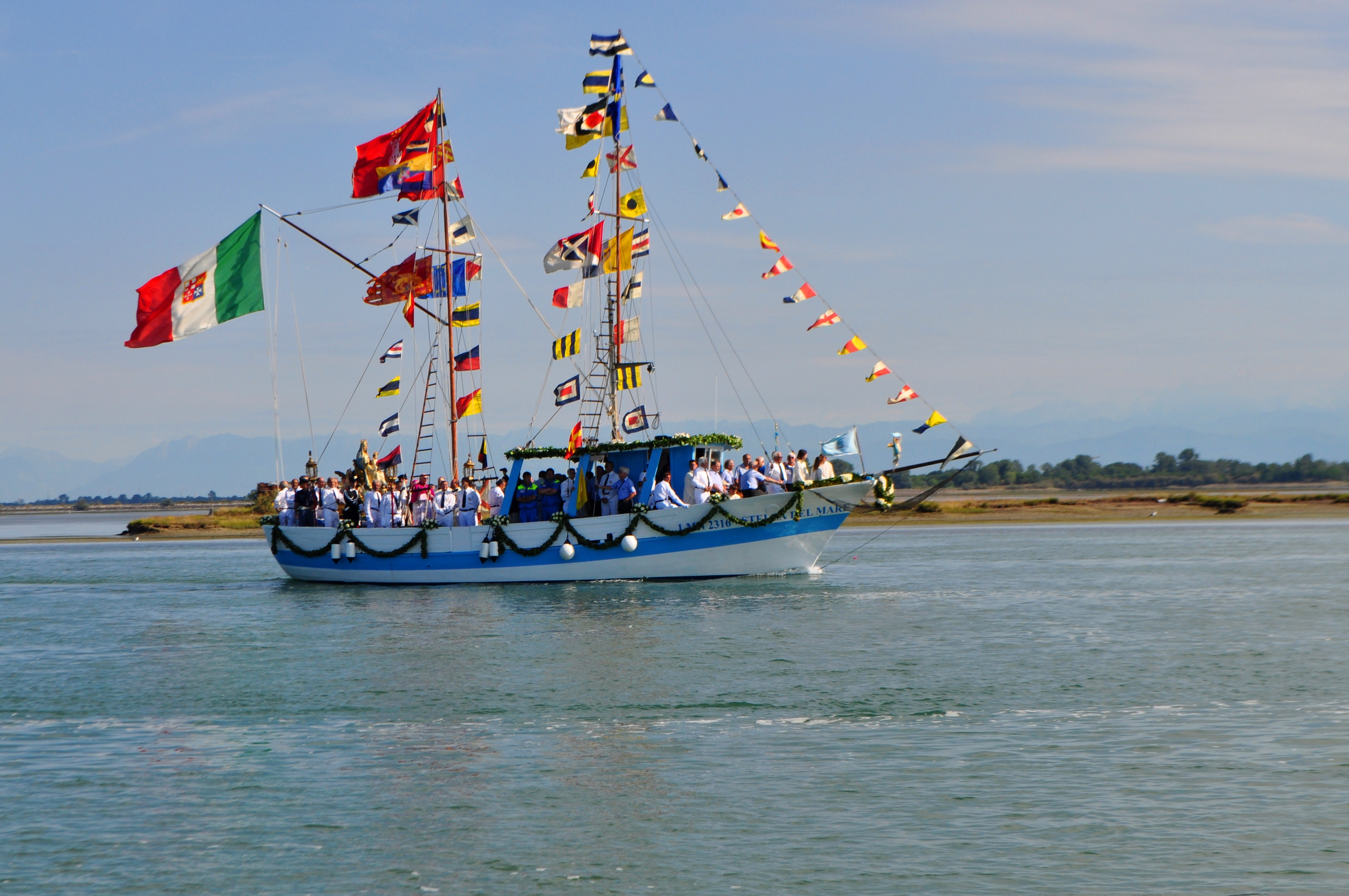 Das Hauptschiff "Stella del Mare" mit der Madonnen-Statue auf dem Weg nach Barbana.